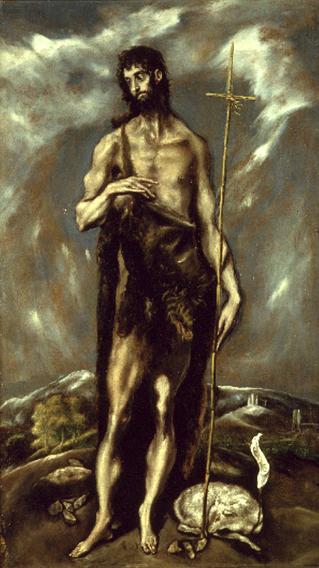 La obra representa al profeta San Juan Bautista, precursor del Mesías y decapitado por orden del rey Herodes Antipas.